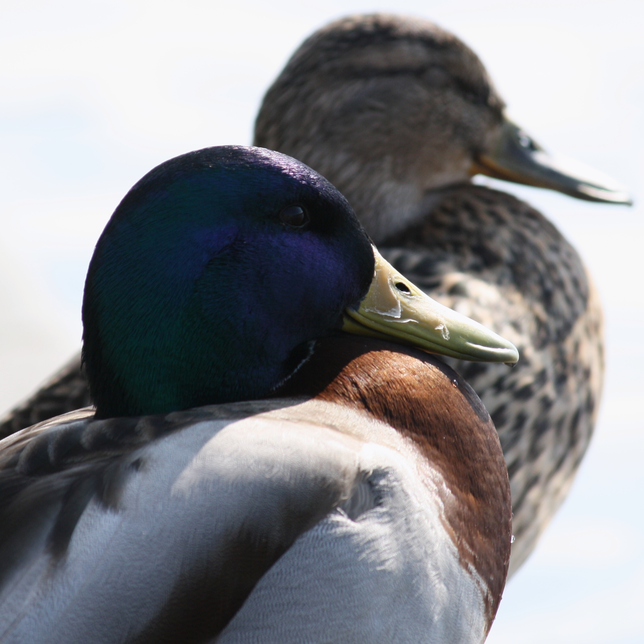 Kachna divoká na Rašínově nábřeží v Praze